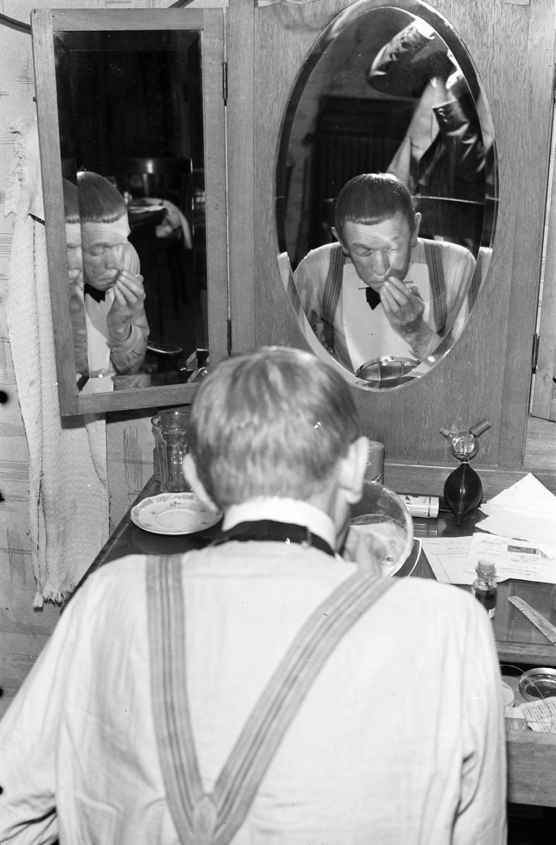 Kabarett der Komiker: Karl Valentin macht Maske